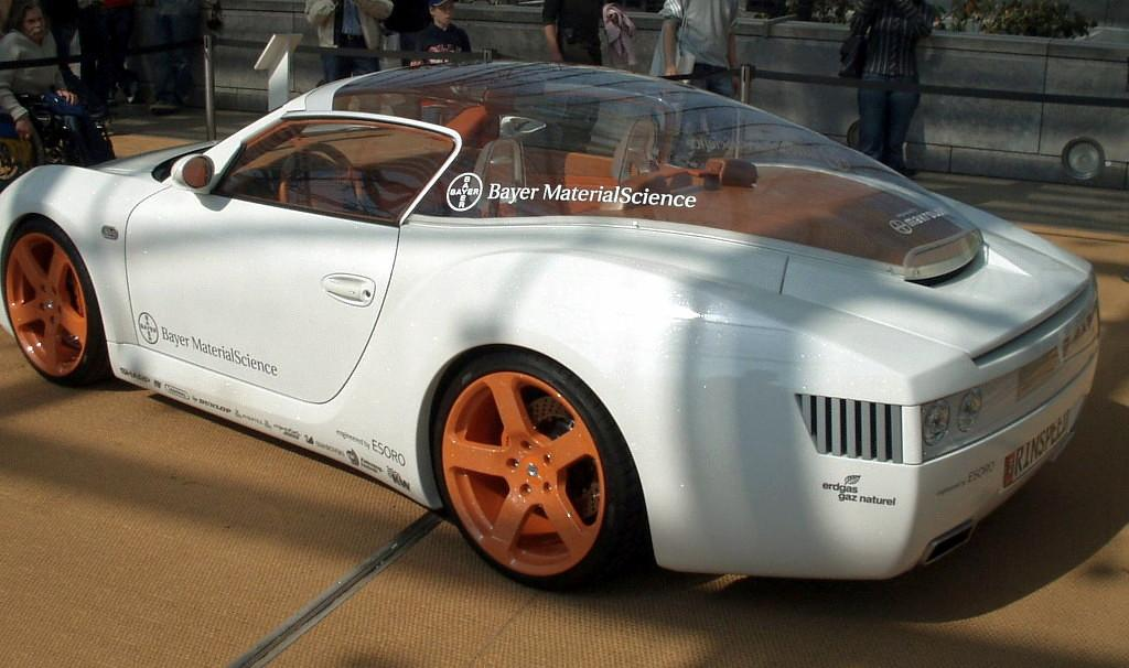 Rinspeed zaZen